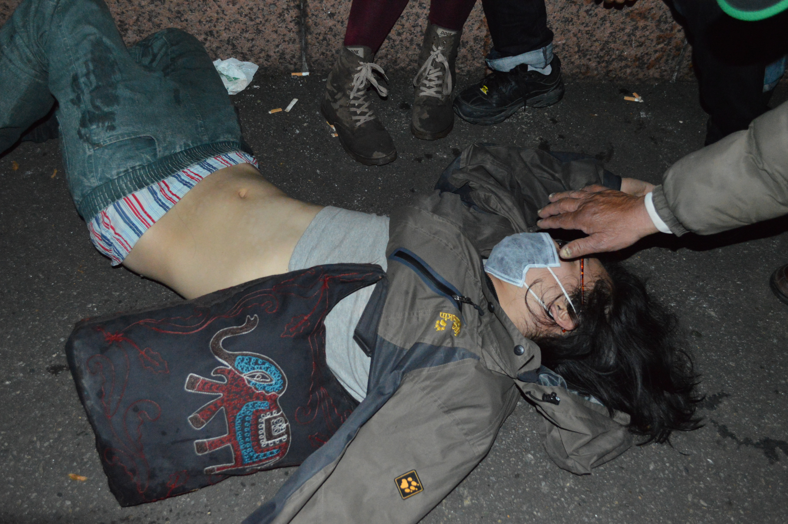 受傷抗議者。